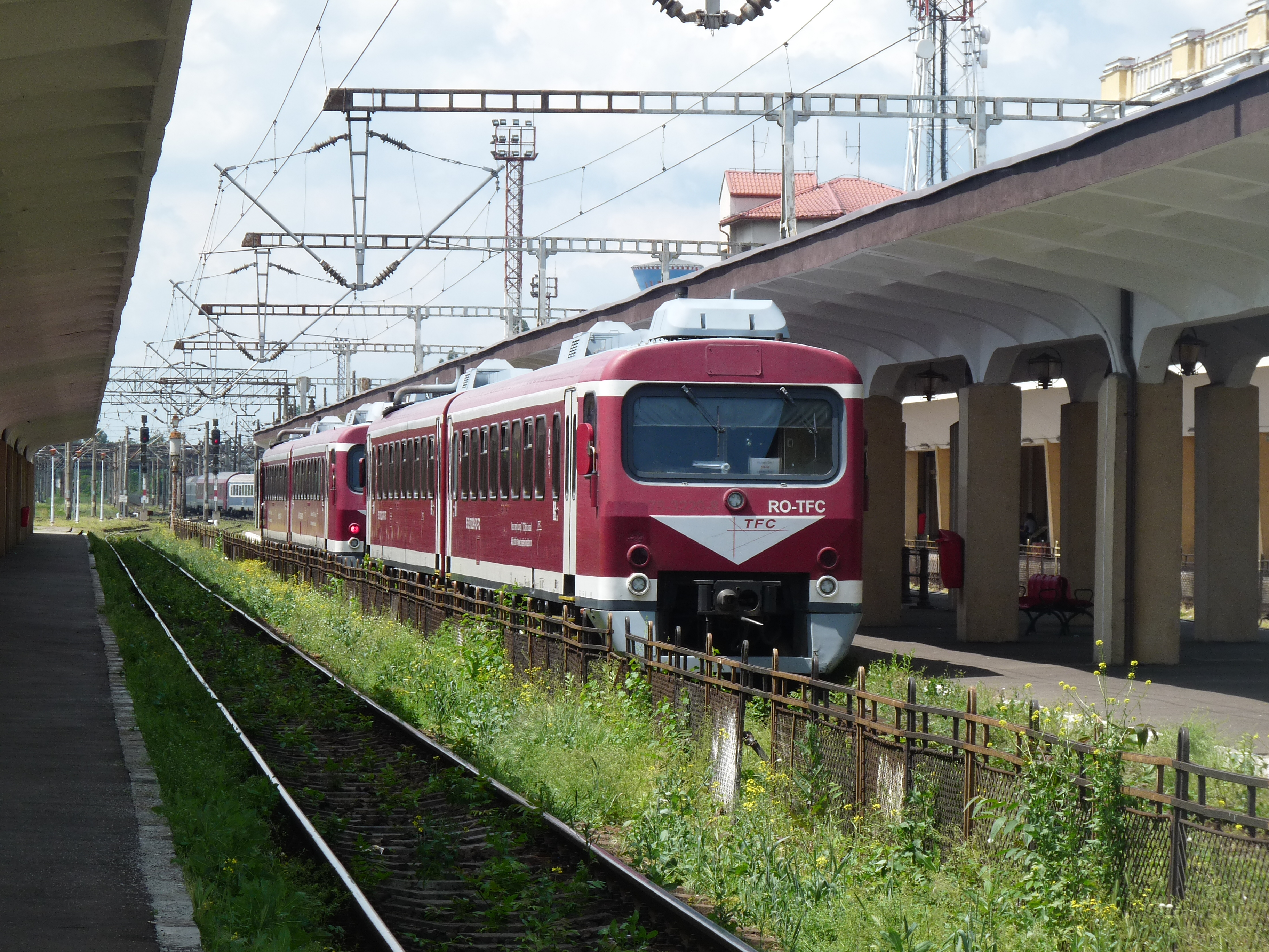 Ploiești station